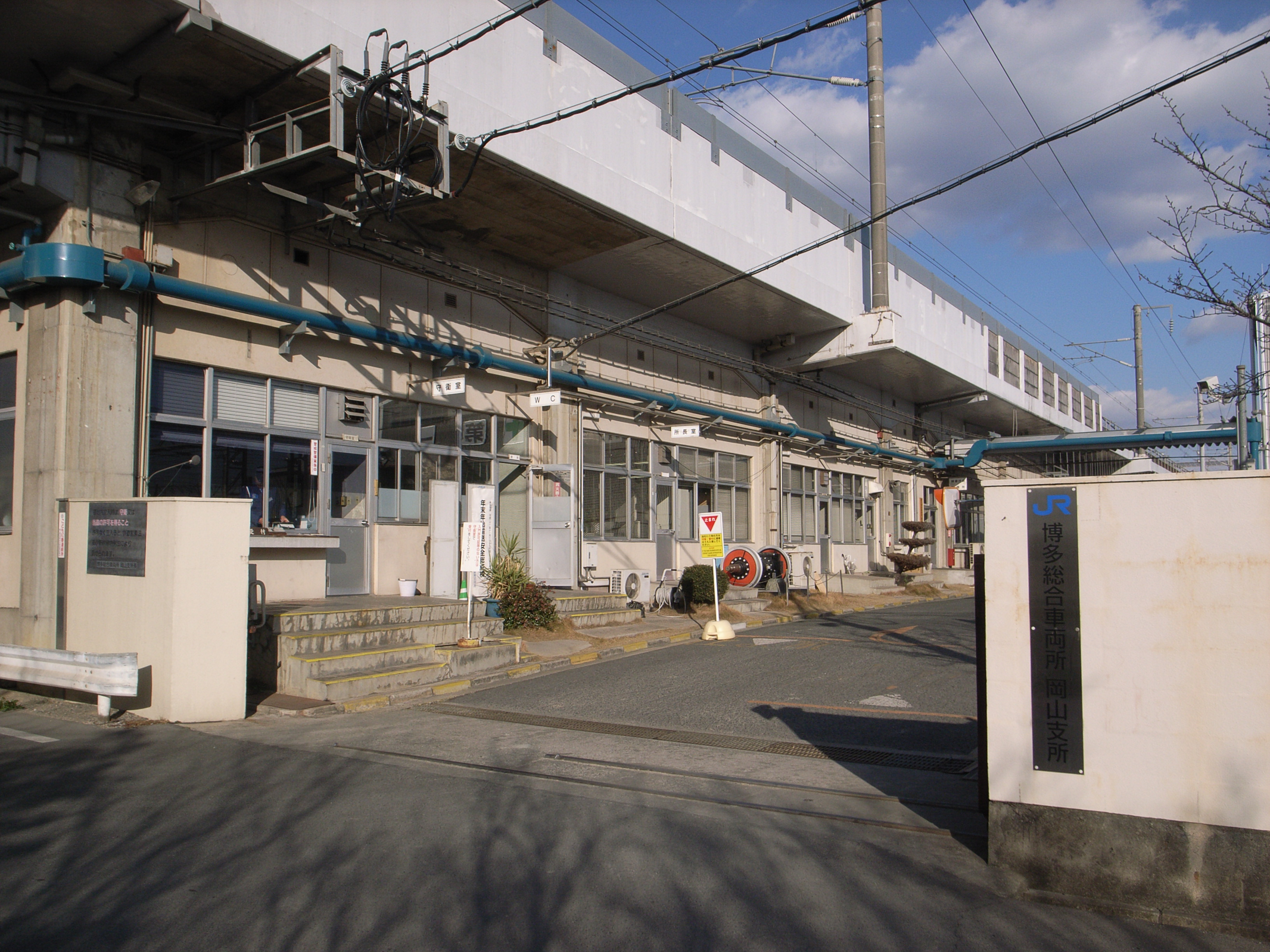 博多総合車両所岡山支所 入口